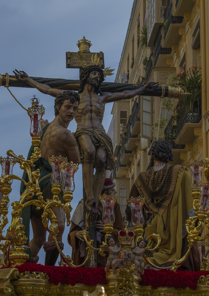 2014 Holy Week in Málaga